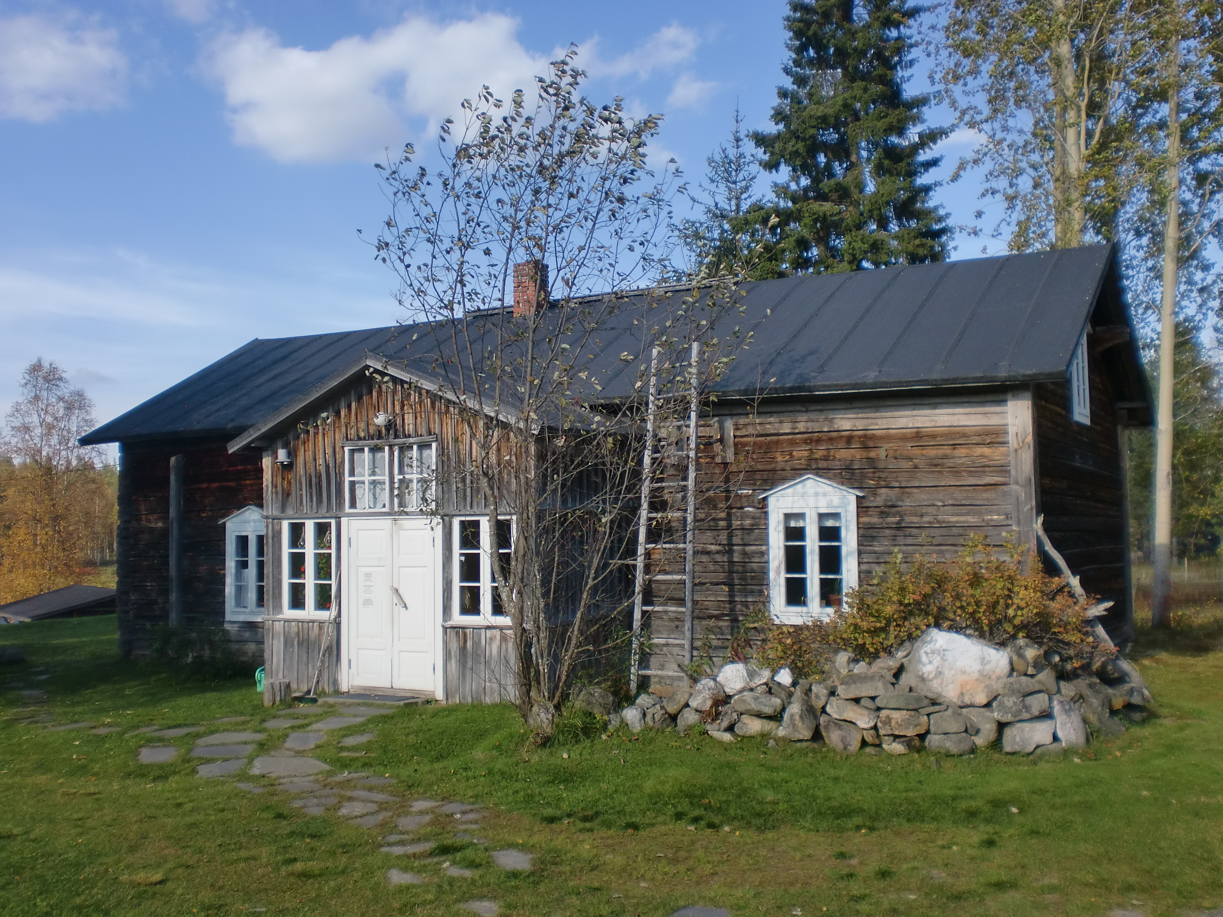 Särestöniemen erämaatila ja ateljee; taiteilijakoti Kittilässä